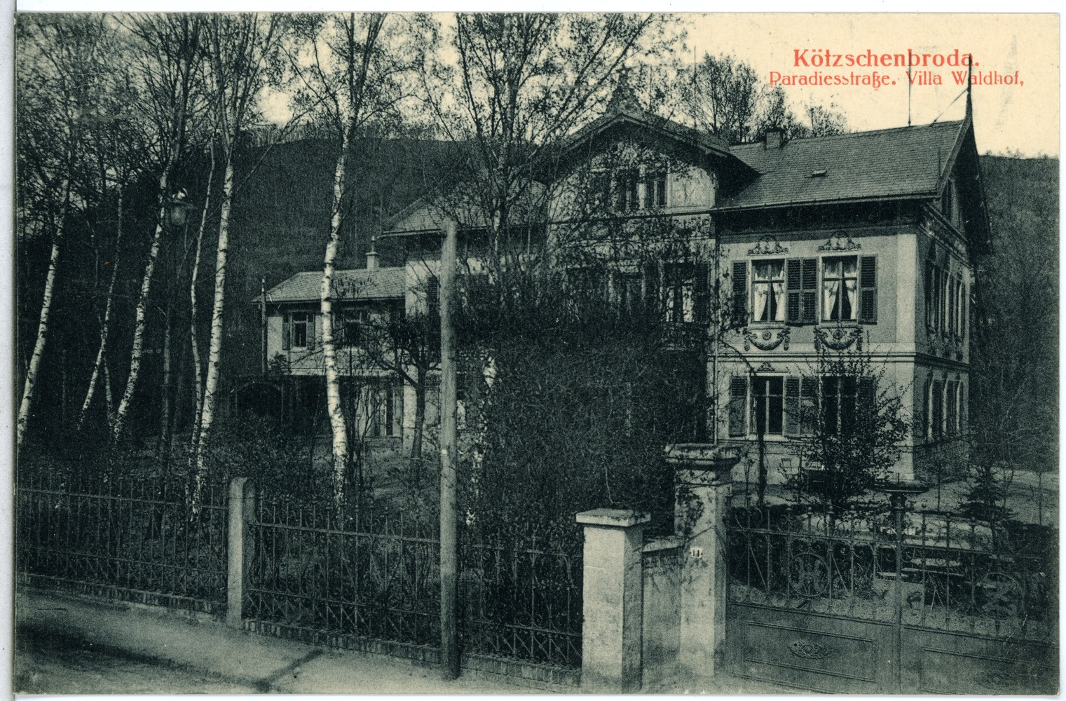 Radebeul; Paradiesstraße, Villa Waldhof in Kötzschenbroda This postcard is from publisher Brück & Sohn in Meißen ( postcard has a unique number 14595 and is available in a higher resolution at the publisher. This images was uploaded in a cooperation project between Wikipedians and the publisher.